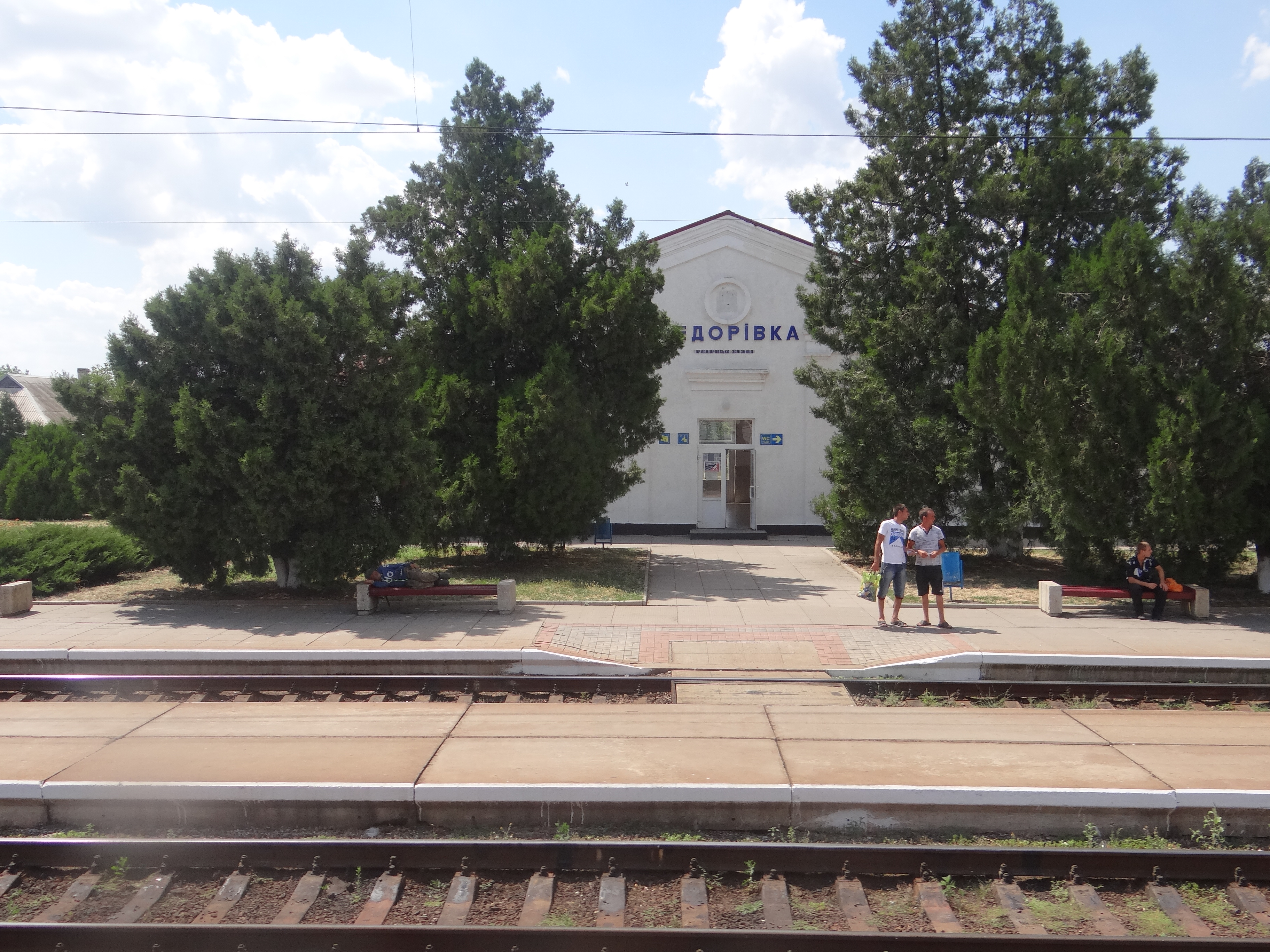 Федорівка